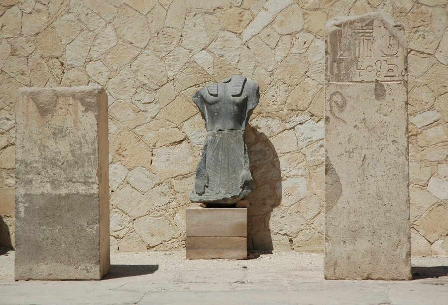 Statuenfragmente einer Statue des Sesostris III. die im Totentempel des Mentuhotep II. in Deir el-Bahari aufgestellt wurden, hier in der unteren Pfeilerhalle des Tempels aufgestellt